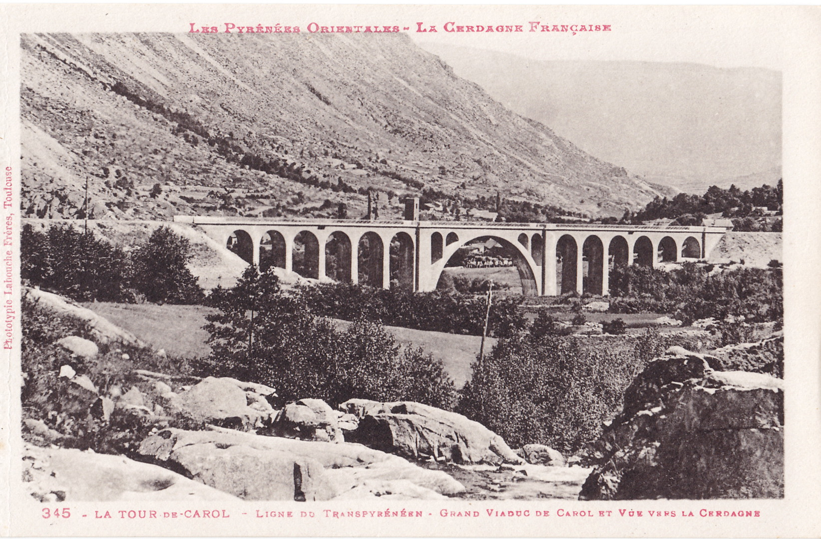 Carte postale ancienne éditée par Labouche, collection Les Pyrénées Orientales - La Cerdagne française, n°345 : La TOUR DE CAROL - Ligne du Transpyrénéen - Grand viaduc de Carol et Vue vers la Cerdagne